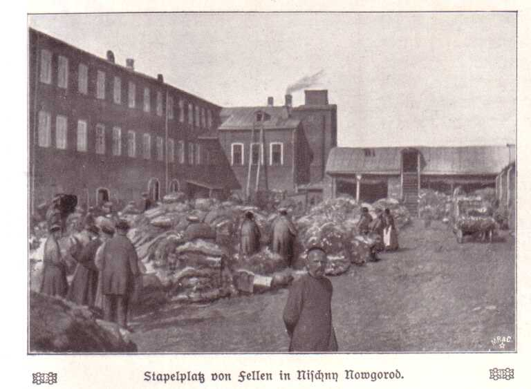 Fur skins in Nizhny Novgorod. Stapelplatz von Fellen in Nischny Nowgorod.